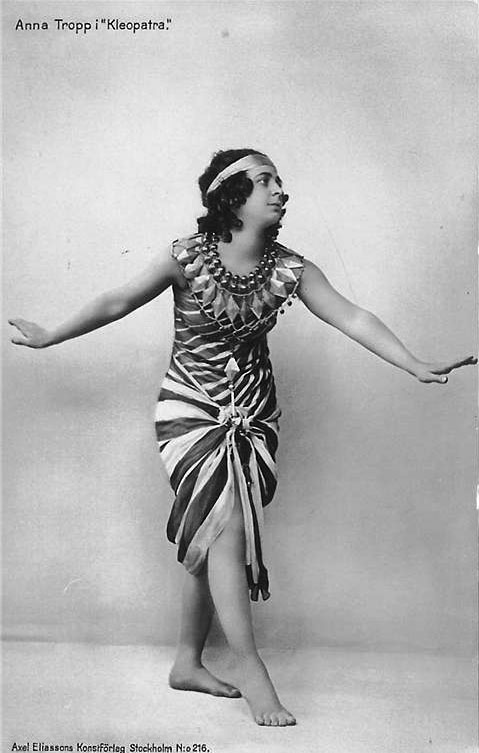 Anna Tropp